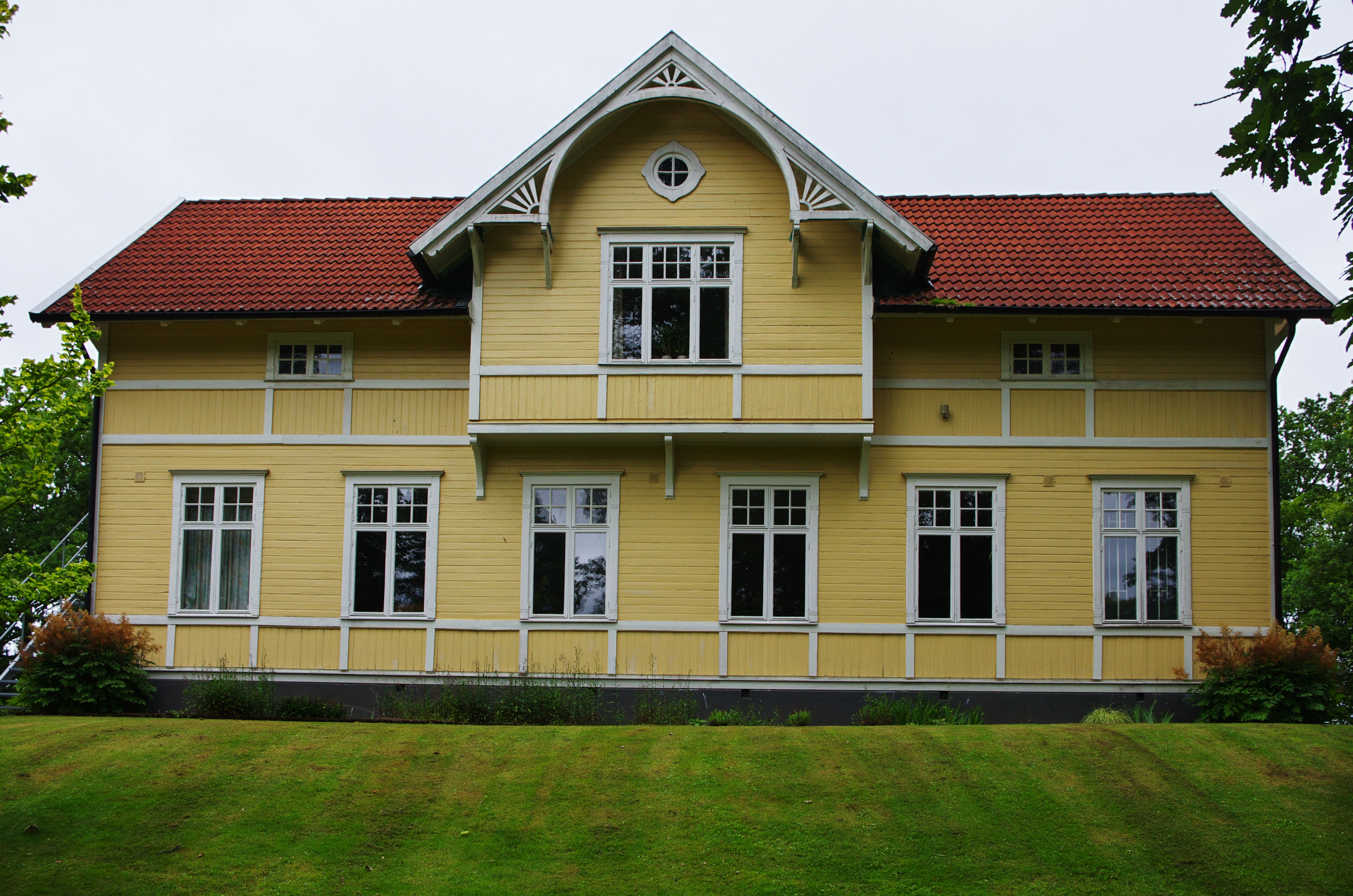 Markaryds folkhögskola.